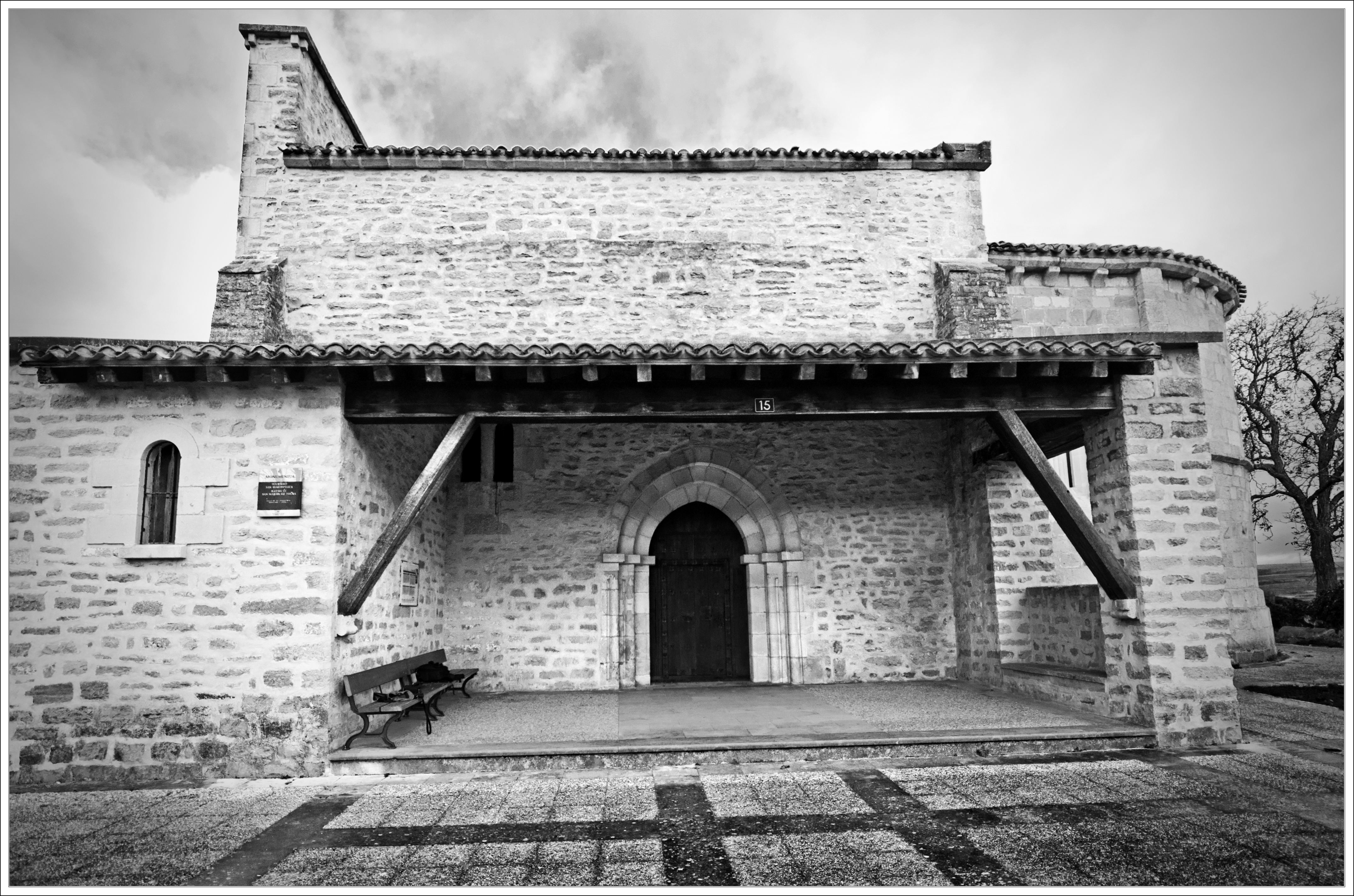 Vista exterior de esta joya de Iglesia (única en Euskadi) situada en el pueblo Alaves de Gaceo, con unas importantes pinturas en su interior del SXIV.